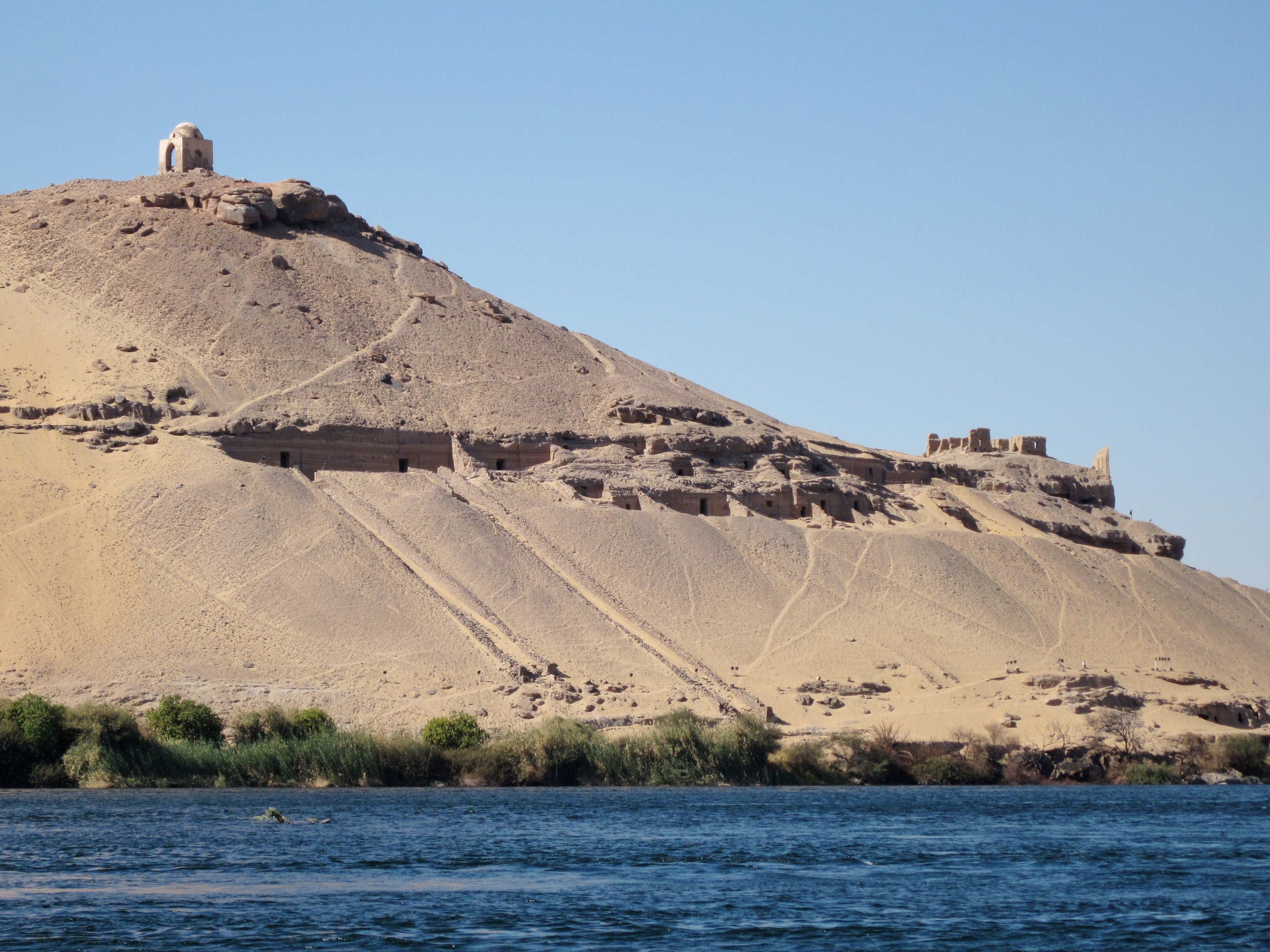 Westliches Nilufer bei Assuan, Ägypten